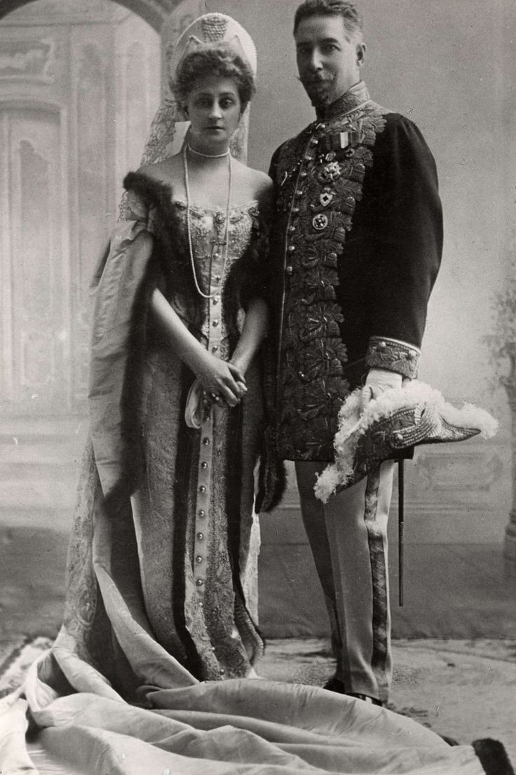 Камергер Глебов Григорий Николаевич (1865—1930) с женой Ольгой Яковлевной (1864—1941; урожденной Тарновской).